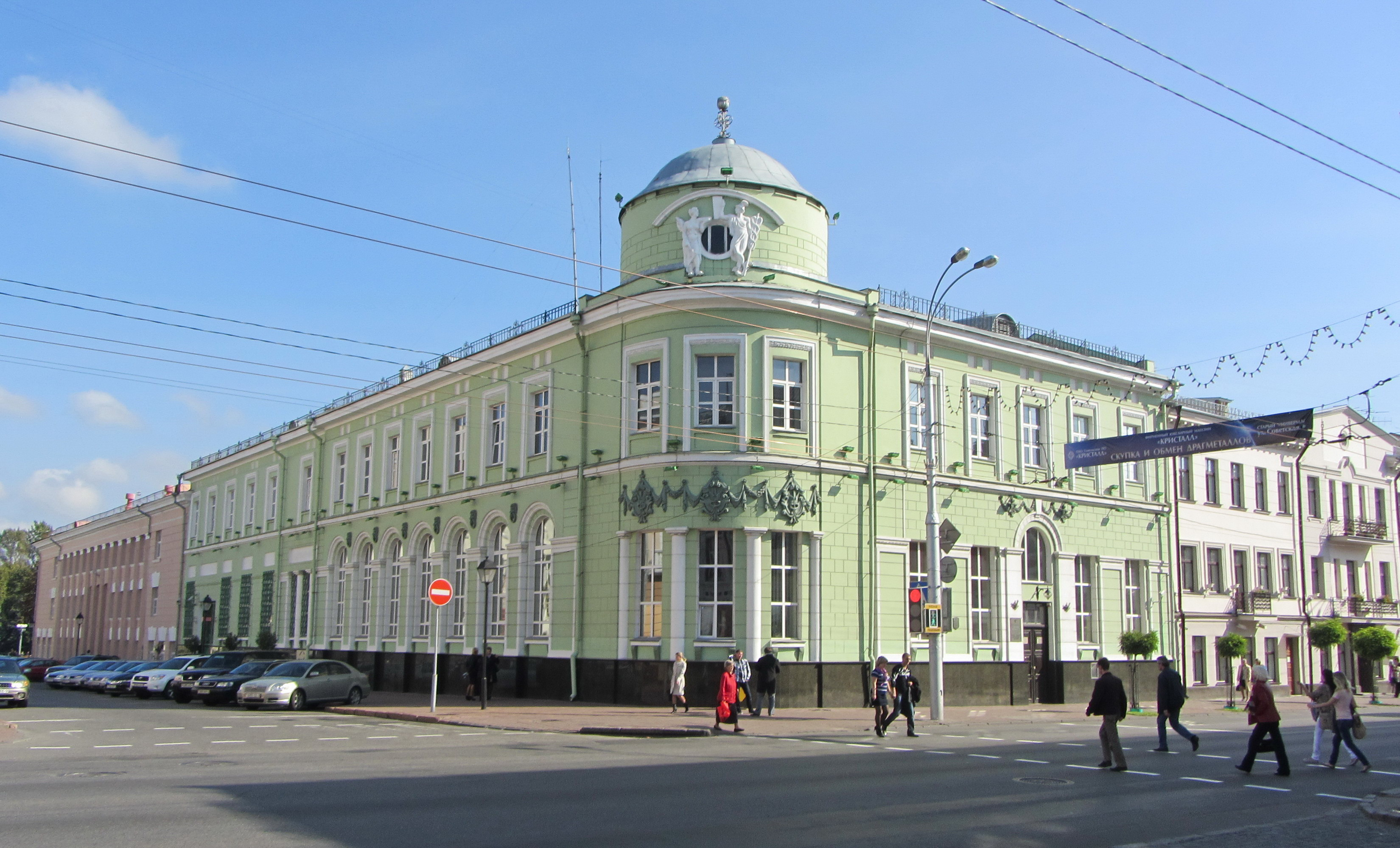 Беларуская (тарашкевіца): Забудова вул. Савецкай. г. Гомель This is a photo of Belarusian heritage monument. Reference number: 313Г000073 ( WLM)